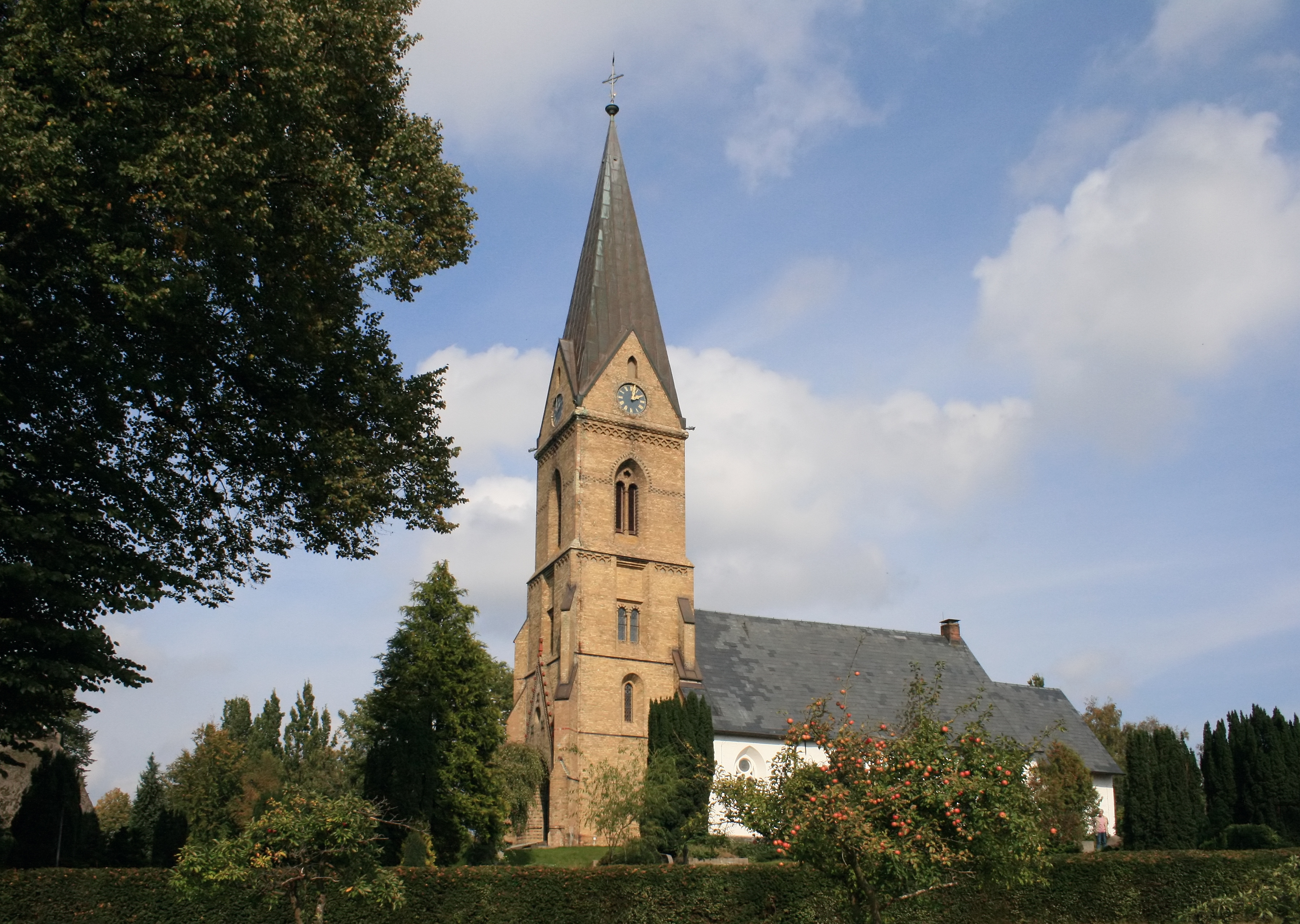 Ev.-luth. St. Jacobi-Kirche, Süderbrarup